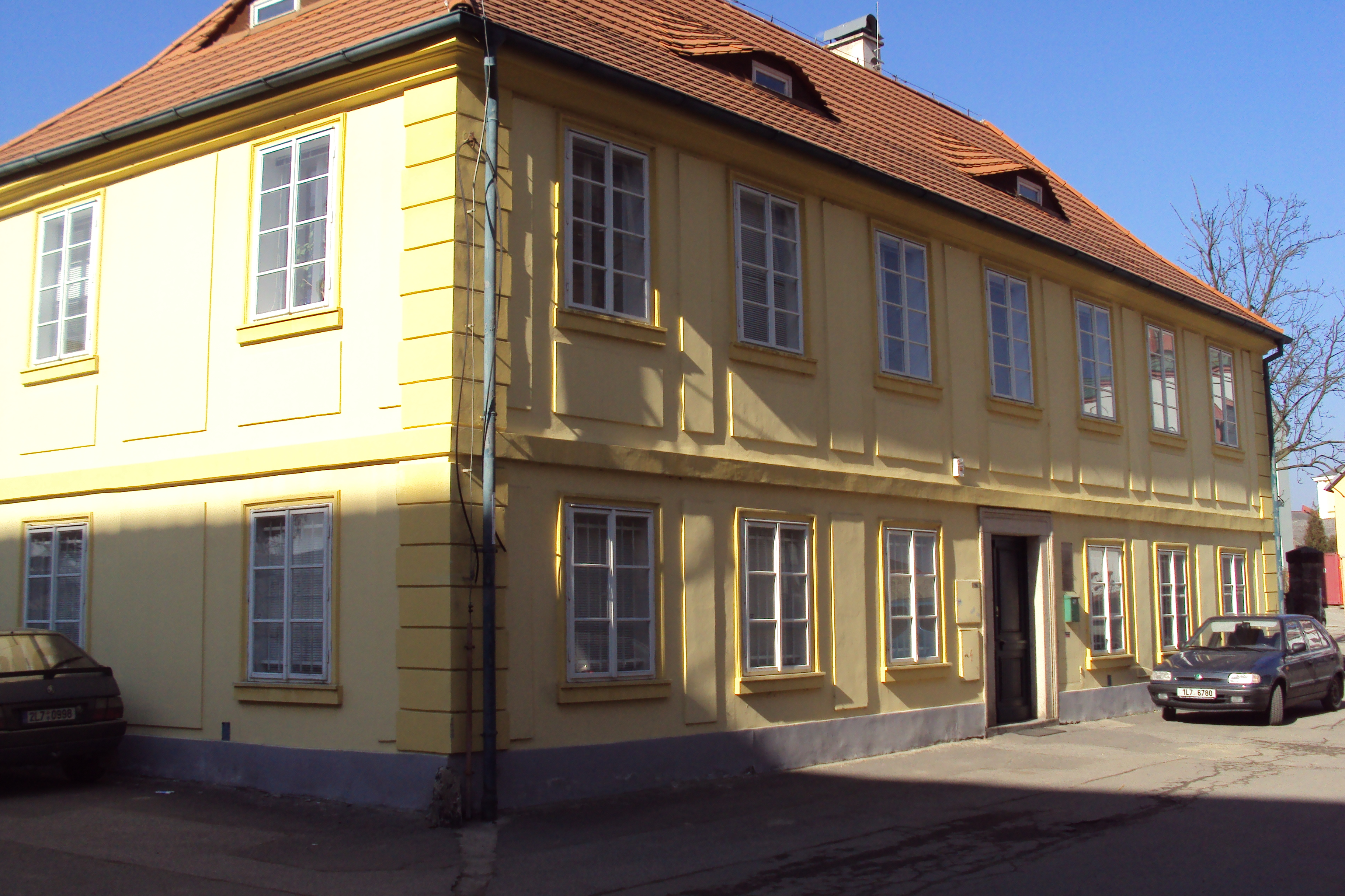 Správa CHKO Lužické hory je v Jablonném